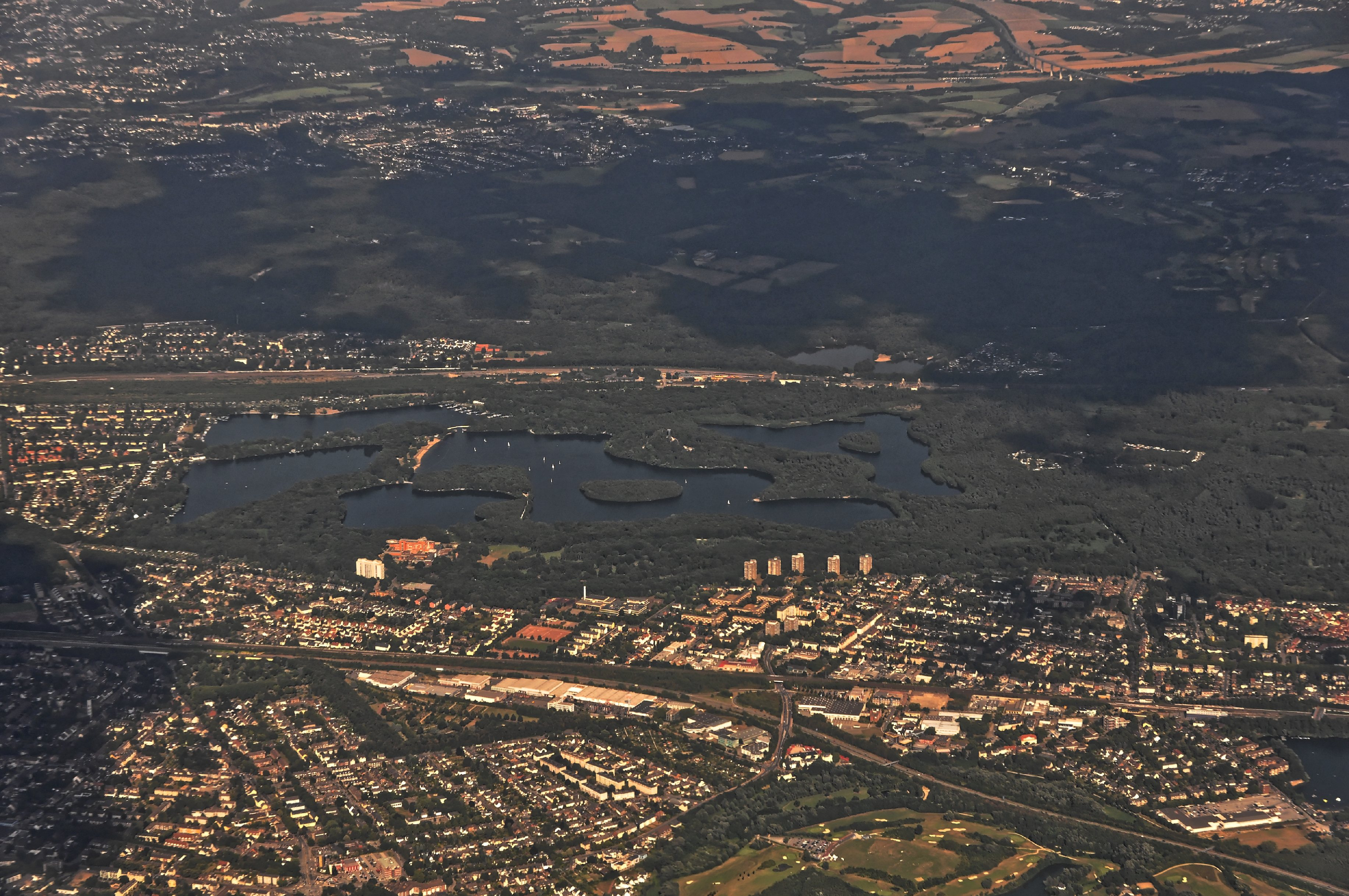 Bilder vom Flug -Rom-Düsseldorf-Hamburg 2013; Duisburg